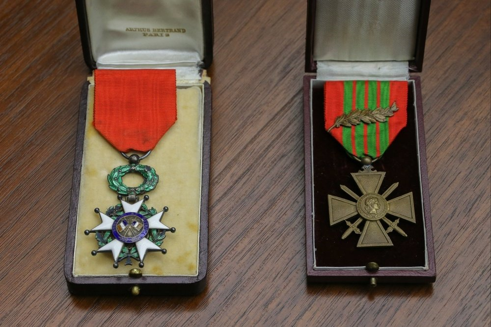 Передача родным Александра Прохоренко реликвий французской семьи Маге. Орден Почётного легиона и Военный крест с пальмовой ветвью